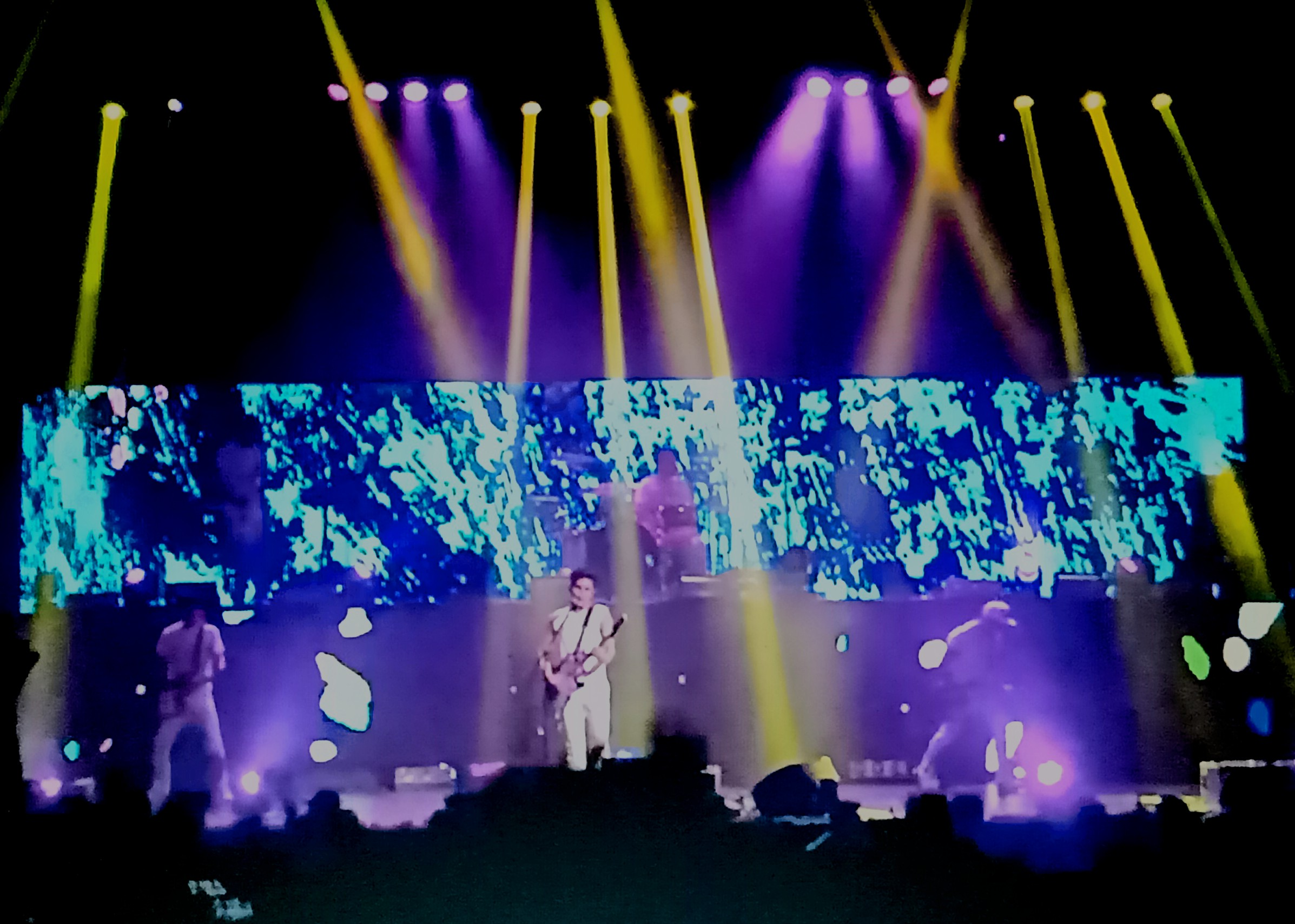 Allison en vivo